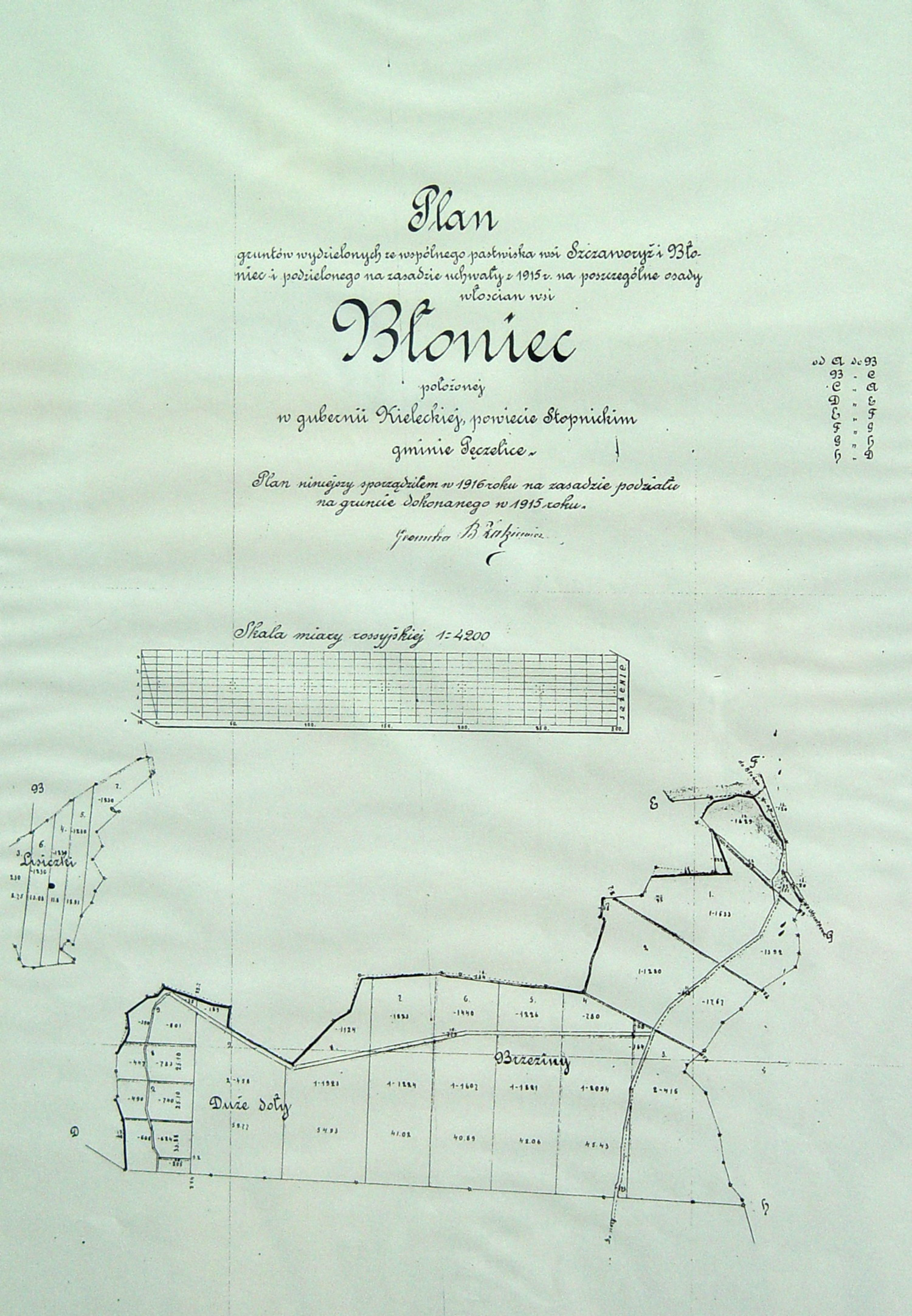 Kopia planu podziału z 1916 r. wspólnego pastwiska wsi Sczaworyż i Błoniec pomiędzy włościan wsi Błoniec.